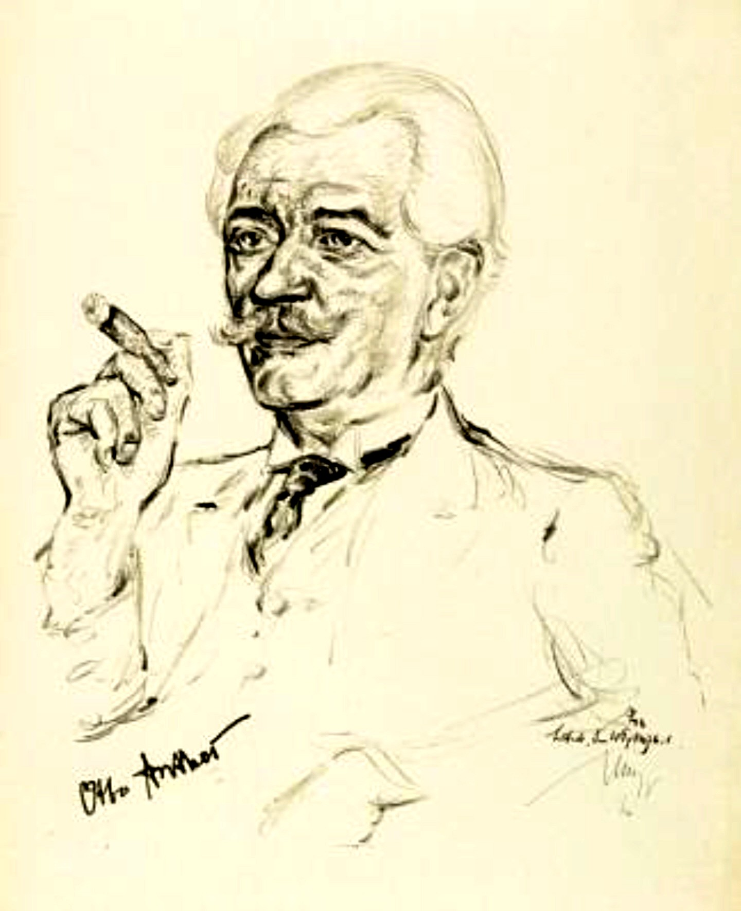 Otto Anthes (* 7. Oktober 1867 in Michelbach a.d.Ahr, Nassau; † 19. November 1954 in Wiesbaden), deutscher Pädagoge und Schriftsteller